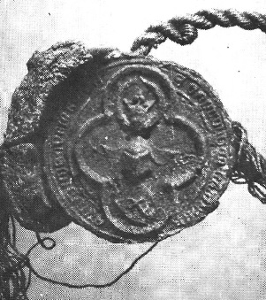 Bebek (I.) Imre országbíró pecsétje 1387-ből